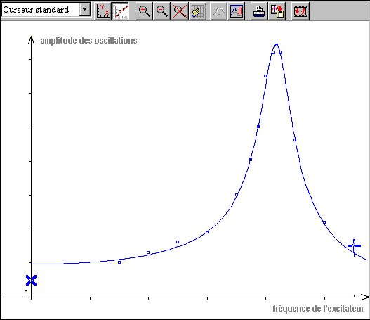 Courbe de résonance d'amplitude du pendule de Pohl